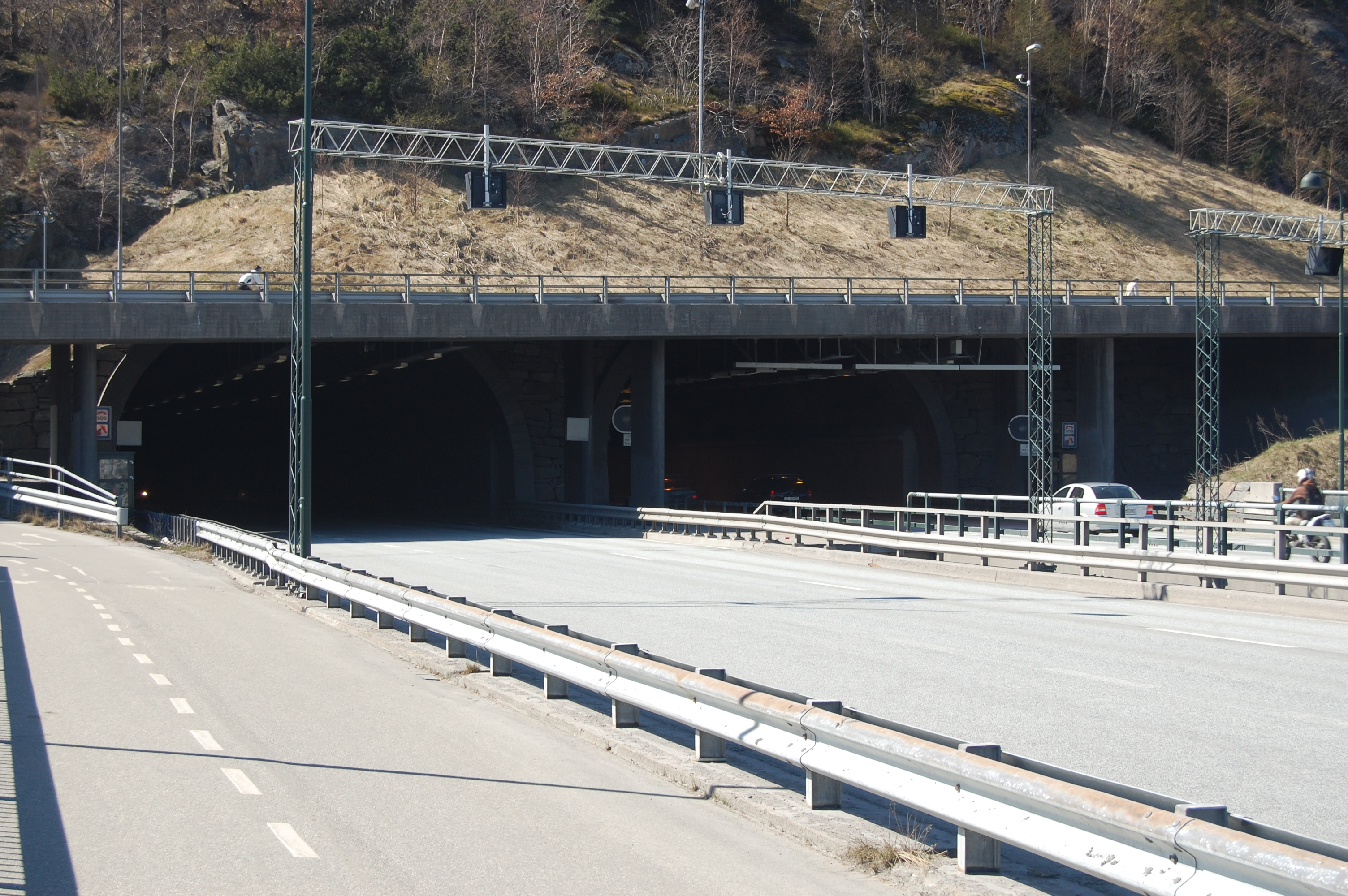 Baneheitunnelen i Kristiansand, sett fra øst